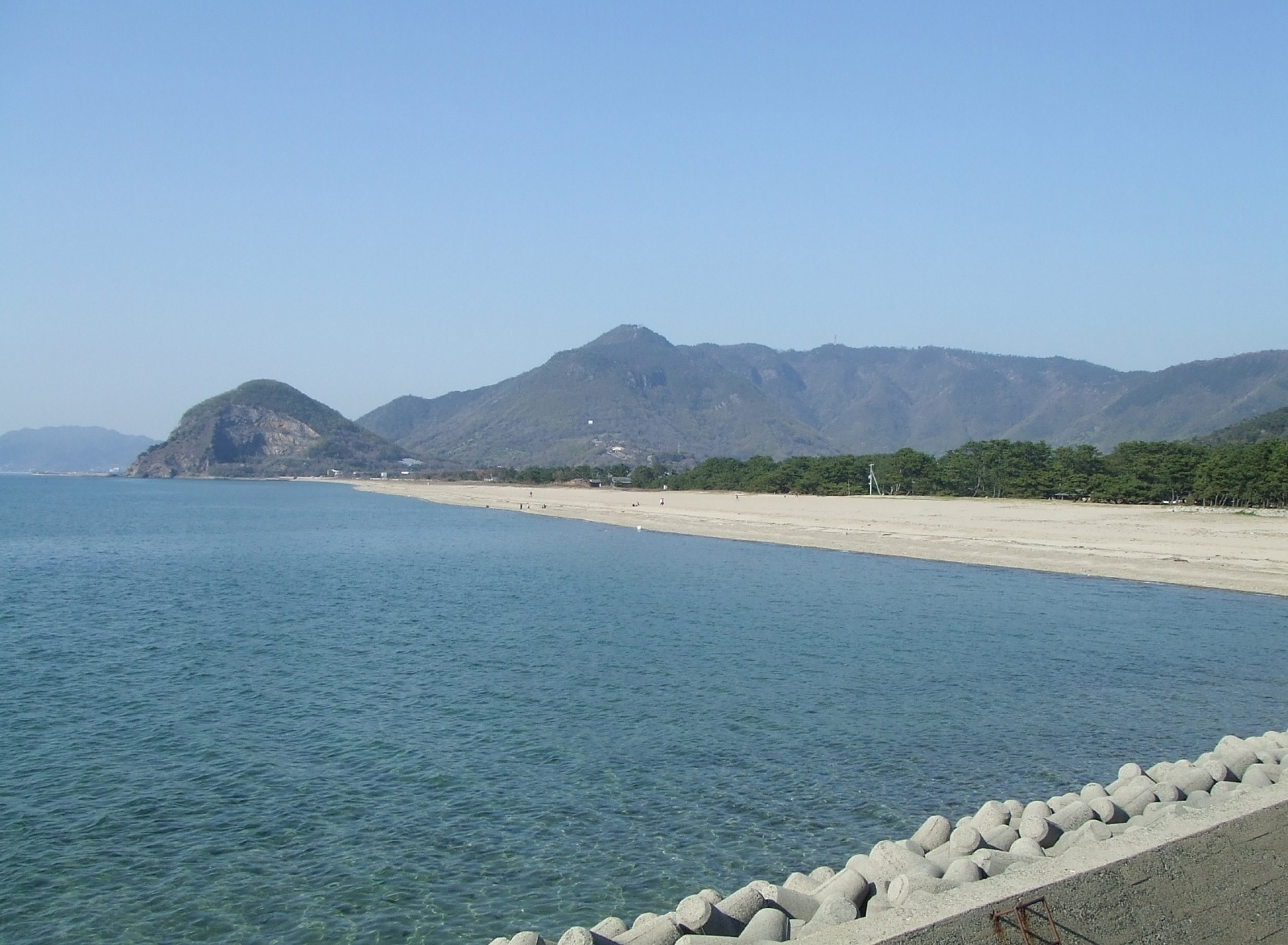 観音寺市の有明浜